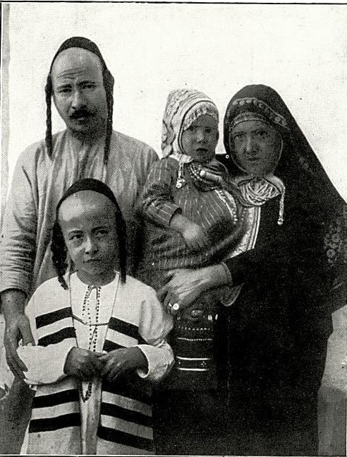 קהילת תימן - משפחה